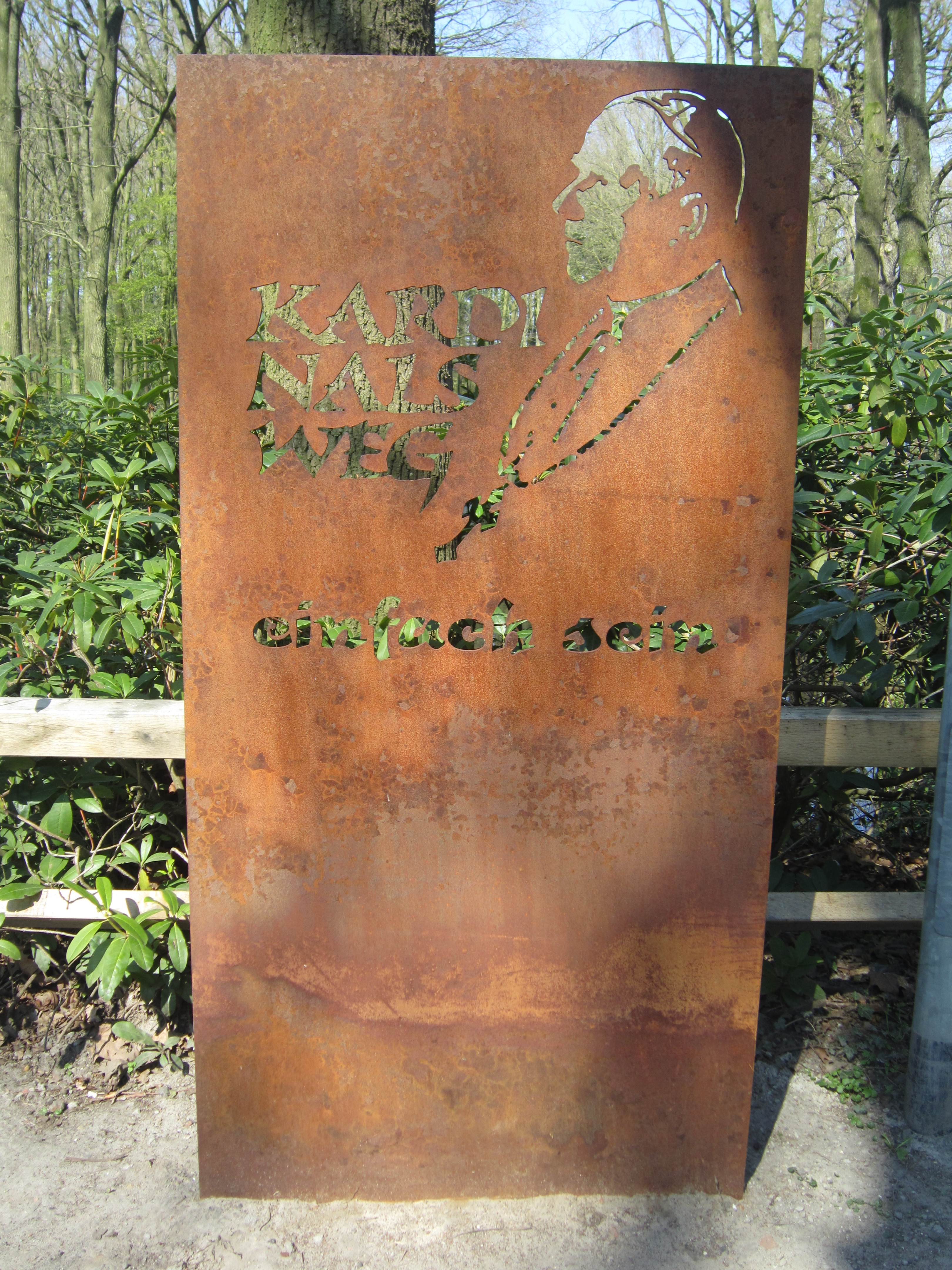 Am Ende des 24 km langen Kardinalswegs vom ehemaligen Benediktinerkloster Damme zur Abtei Burg Dinklage steht eine eiserne Stele mit dem Porträt des Kardinals Graf von Galen, der in der Burg geboren wurde, und der Inschrift "einfach sein". Die Stele soll die Wanderer an die Kardinalstugend der Einfachheit erinnern.